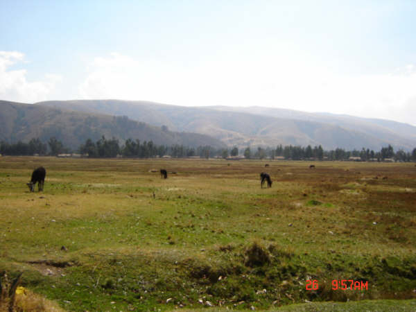 Paisaje de Masma